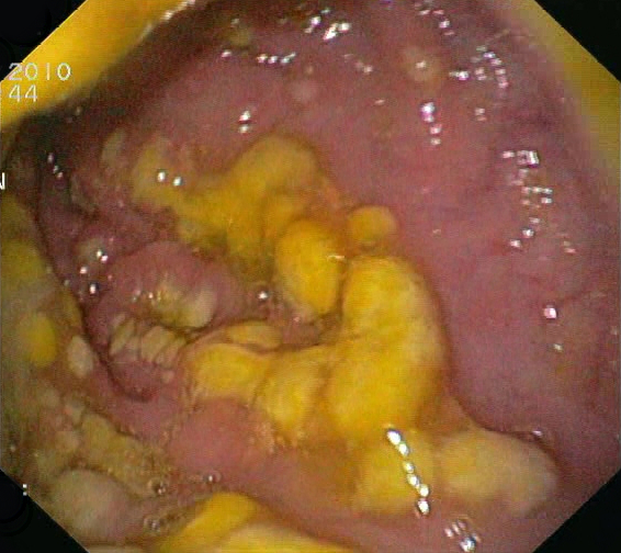 Endoskopisches Bild einer pseudomembranösen Kolitis.